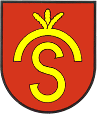 Herb miasteczka Stojanów z 1590